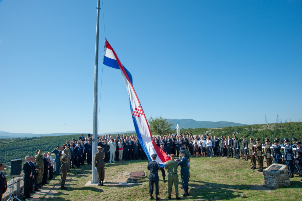 16. obljetnica vojnoredarstvene operacije Oluja u Kninu